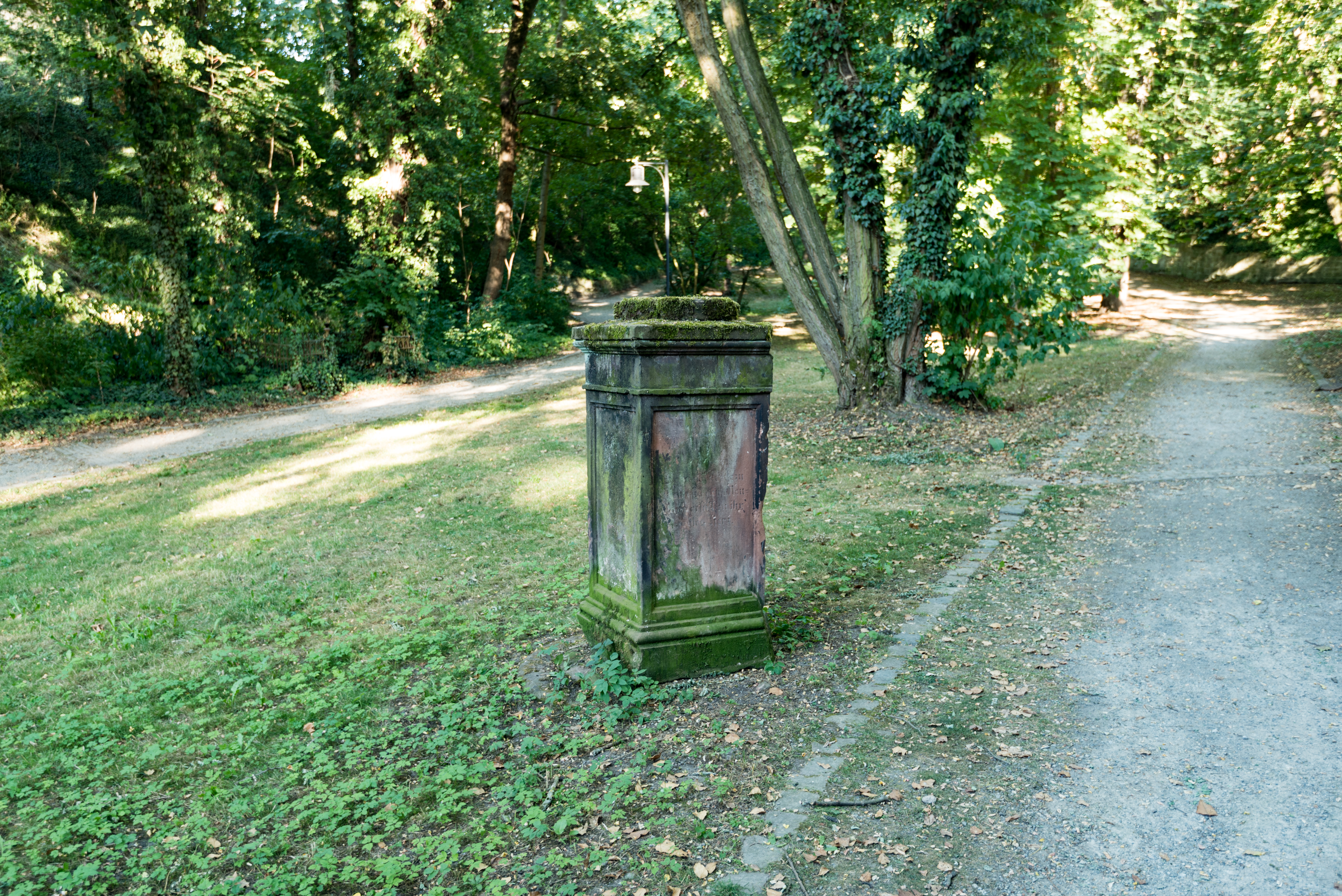 Weißenfels, Stadtpark